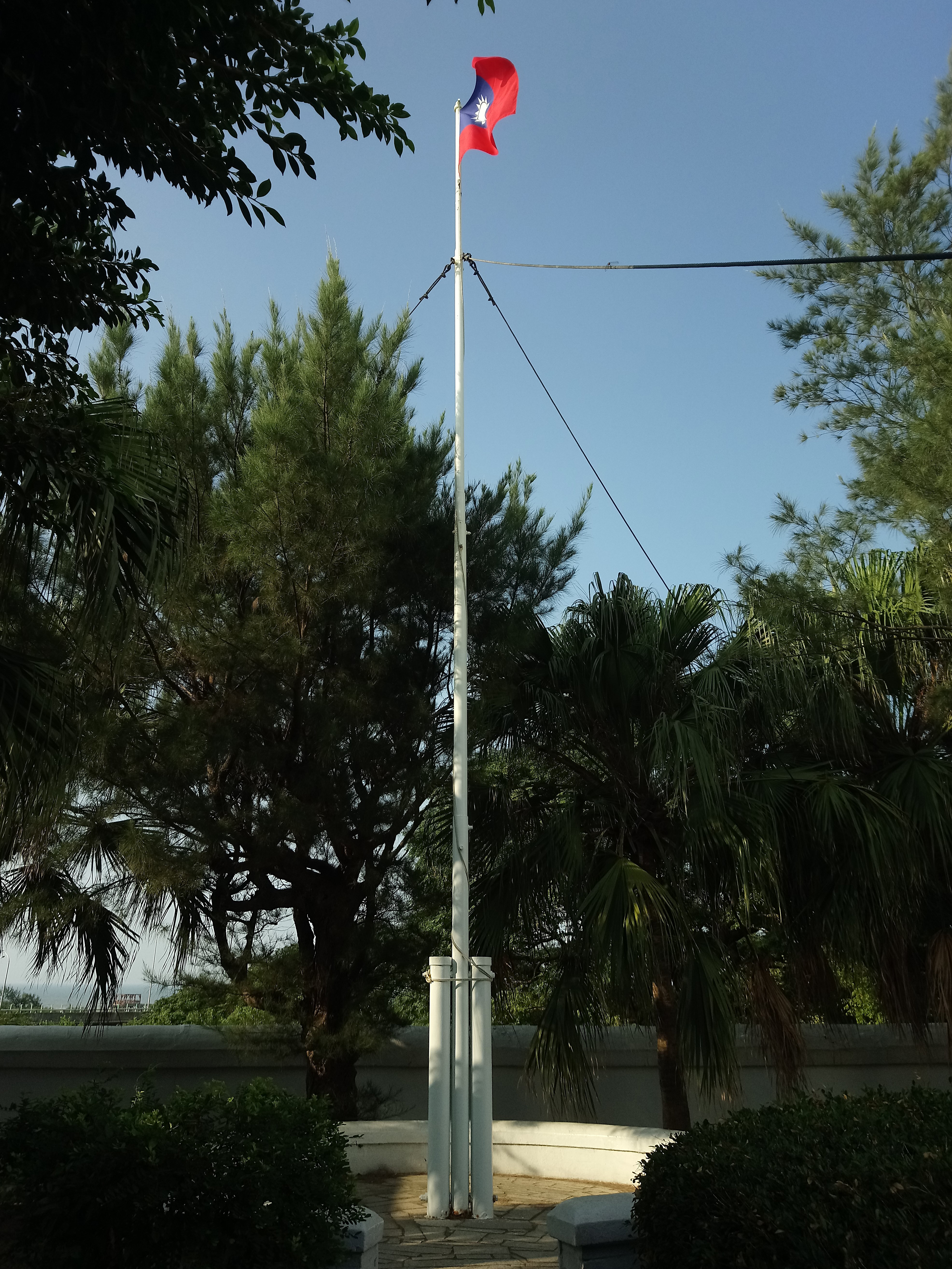 白沙岬燈塔旗桿升起中華民國國旗